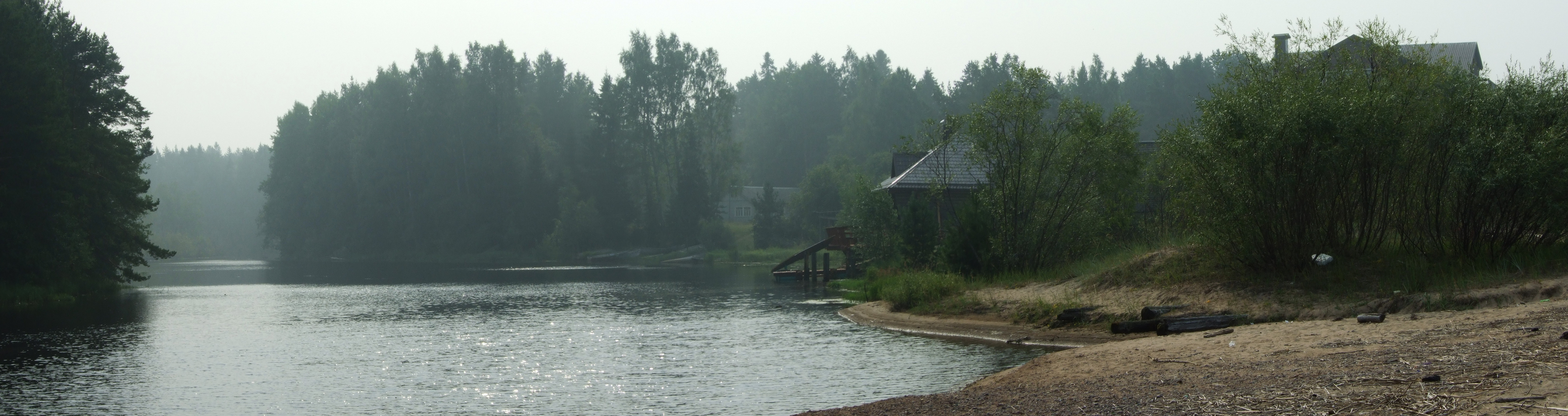 На реке Обжанка перед впадением в Ладогу